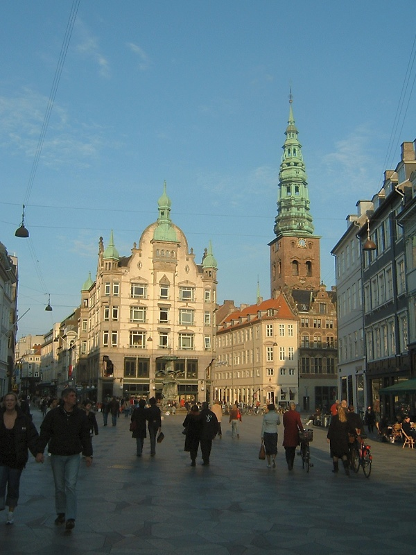 Voetgangersgebied in Kopenhagen